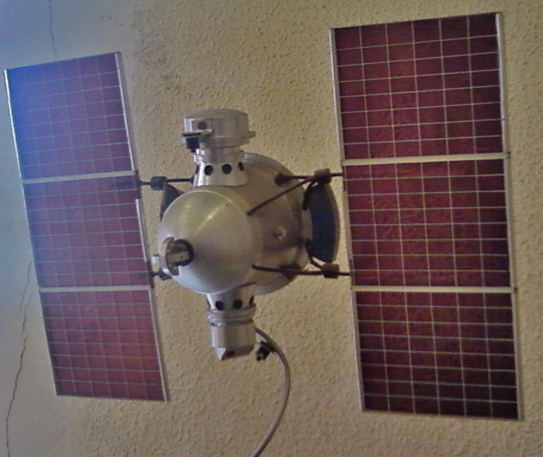 Модель КА "Омега"